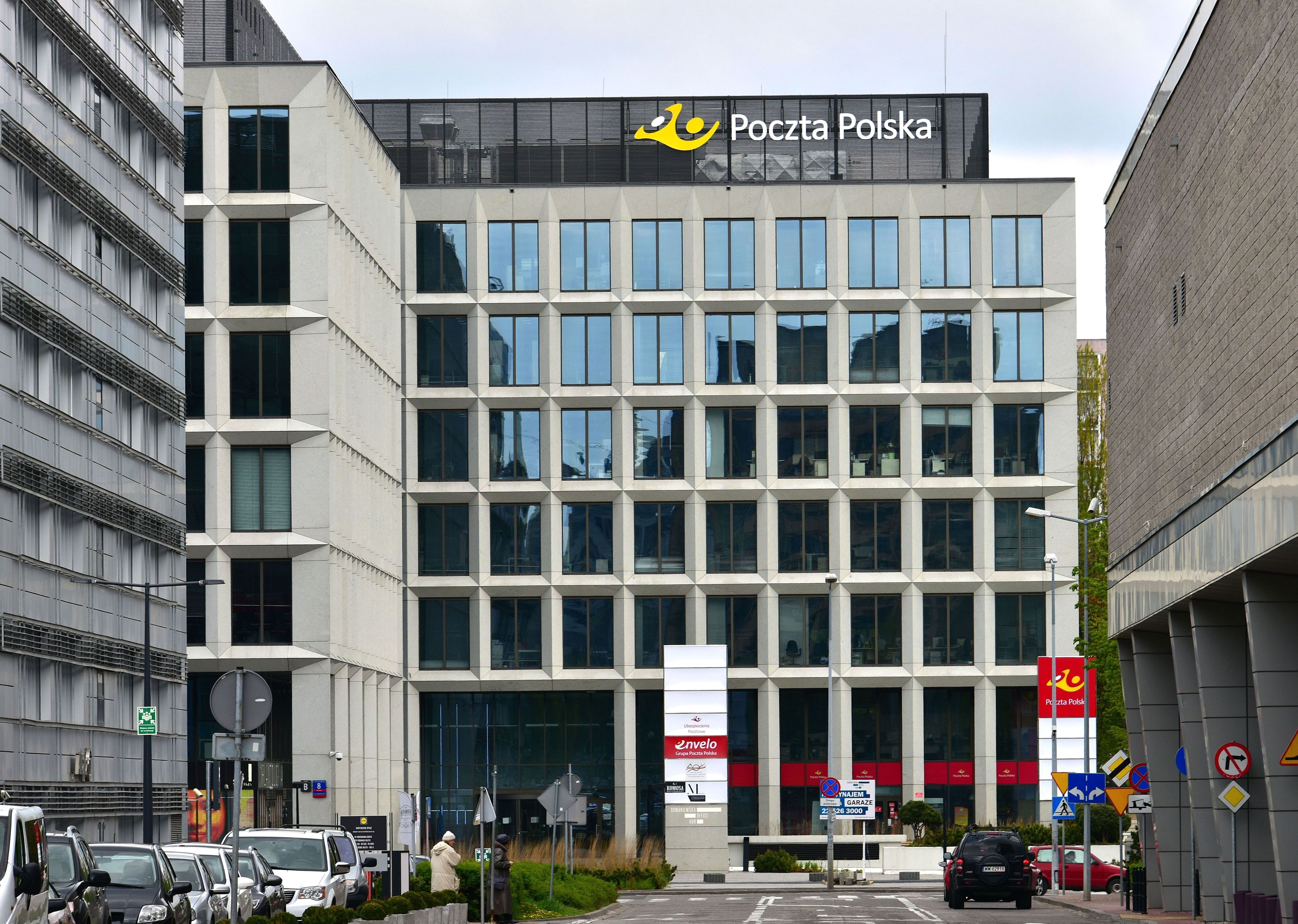 Centrala Poczty Polskiej ul. Rodziny Hiszpańskich 8 w Warszawie